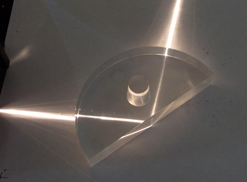 Illustration "Totalreflexion" basierend auf "Total internal reflection" - für die Miniaturdarstellung optimiert.